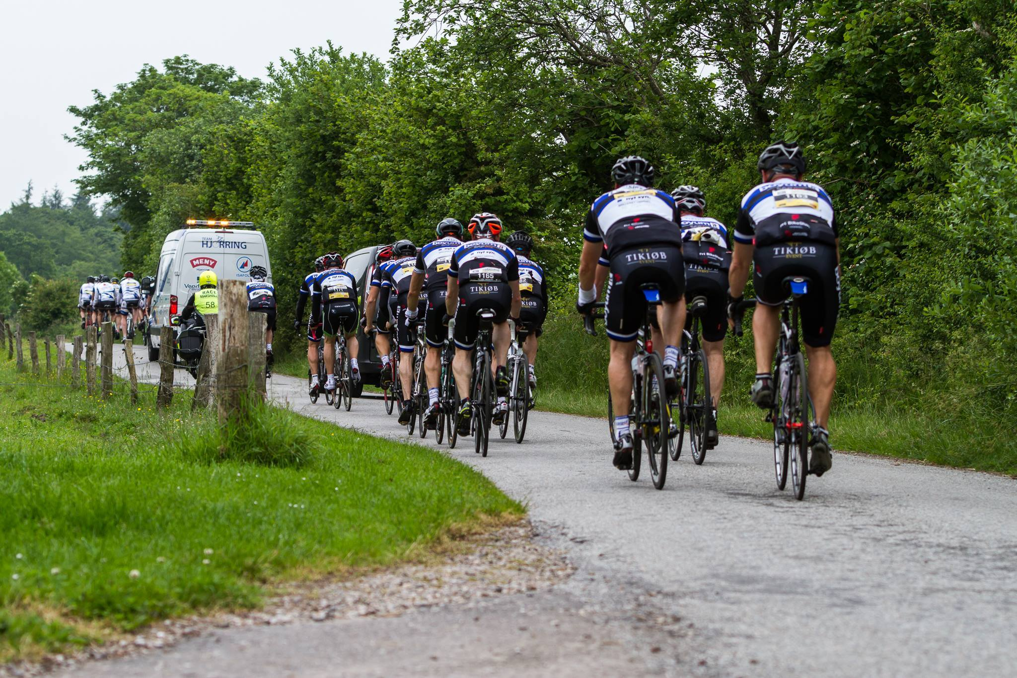 Motionsløb